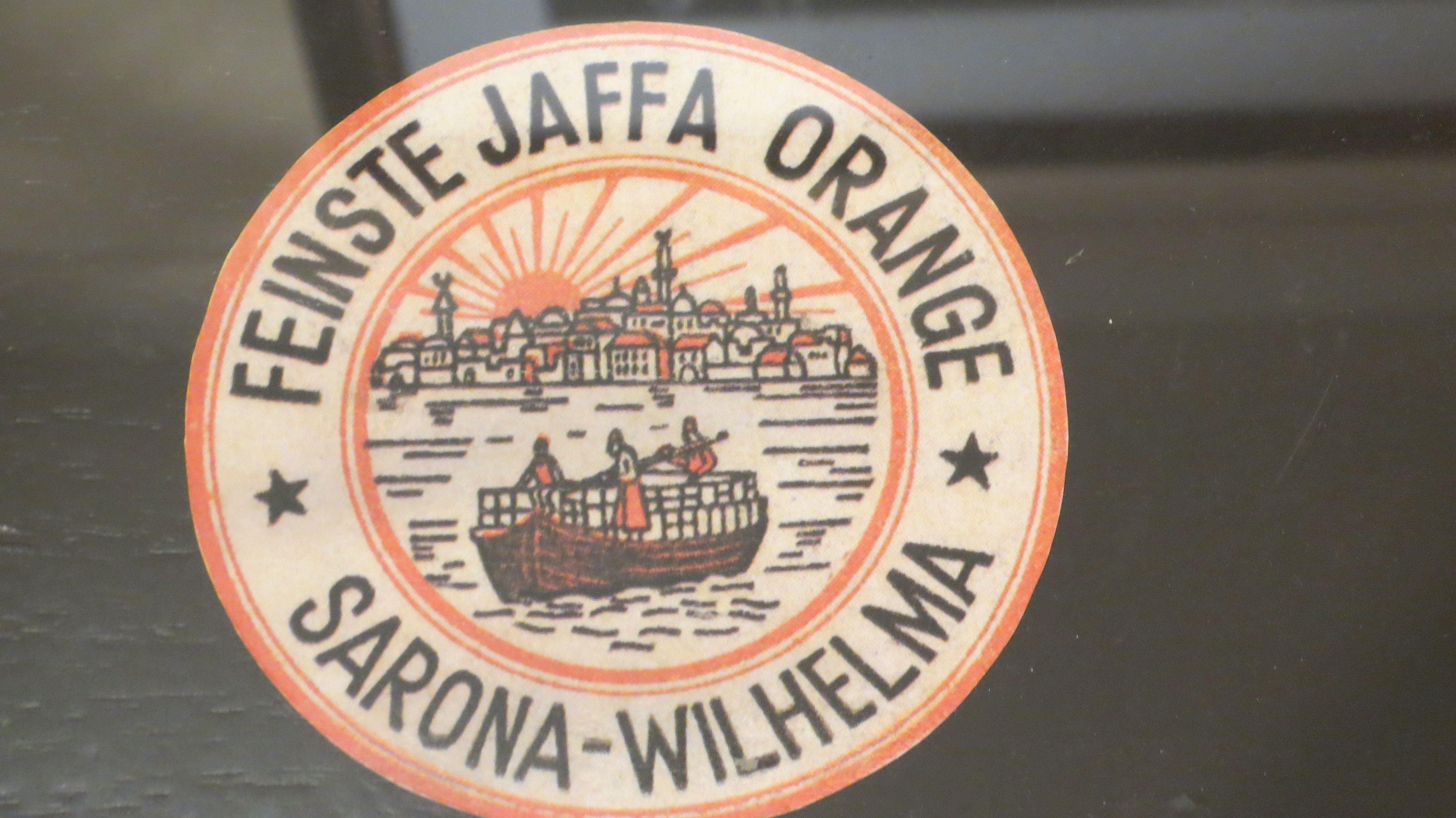 Sarona Market, Tel Aviv שרונה מרקט